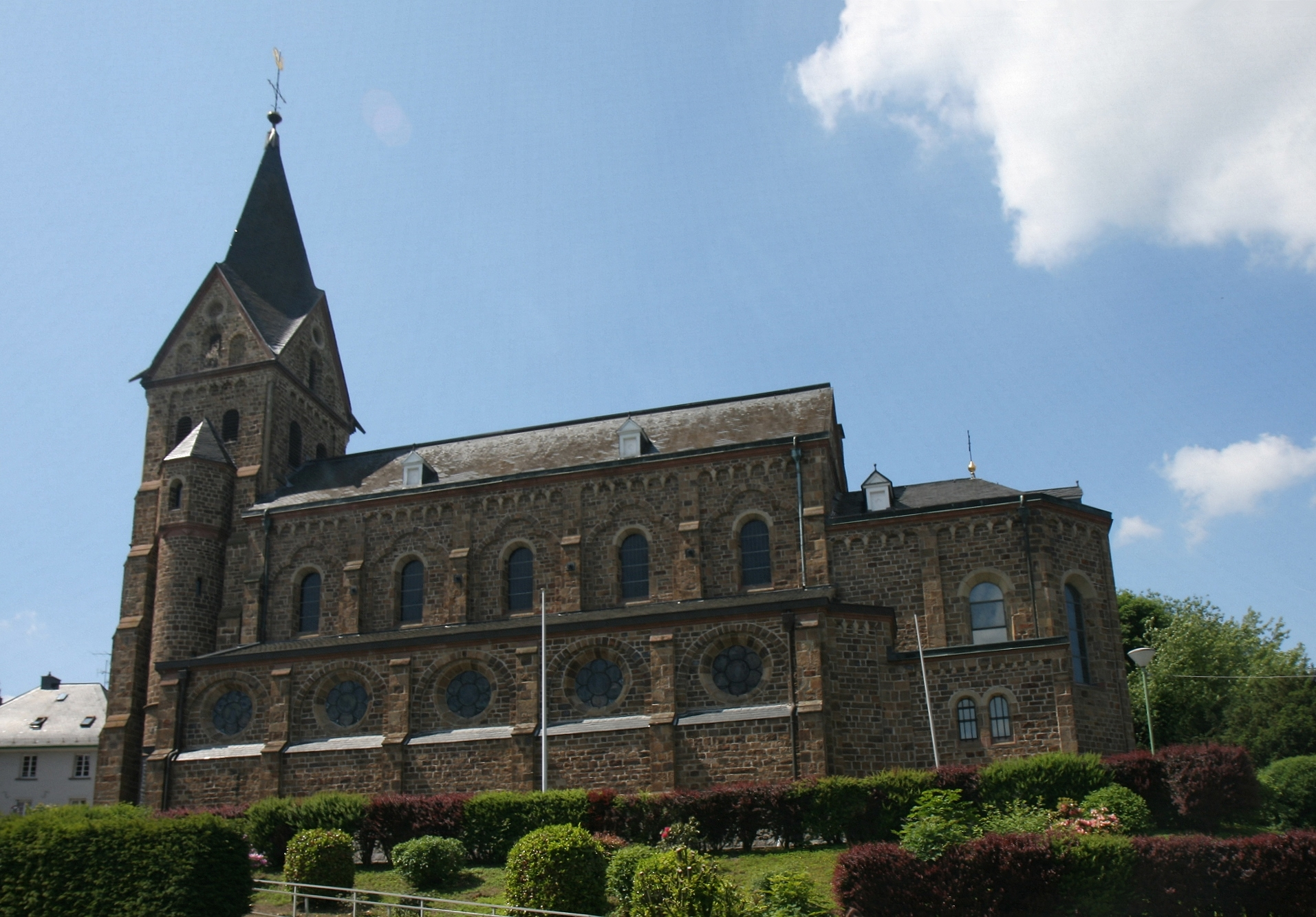 Katholische Pfarrkirche St. Mariä Himmelfahrt in Hückeswagen.